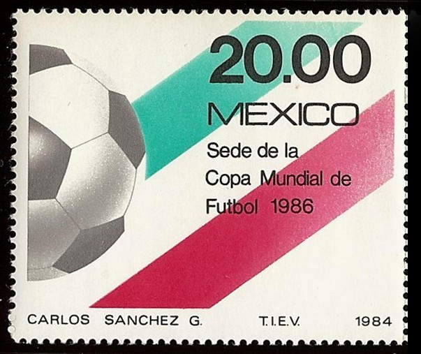 Estampilla alusiva a la designación de México como sede del Campeonato Mundial de Fútbol de 1986. Se muestra medio balón sobre fondo de colores nacionales.